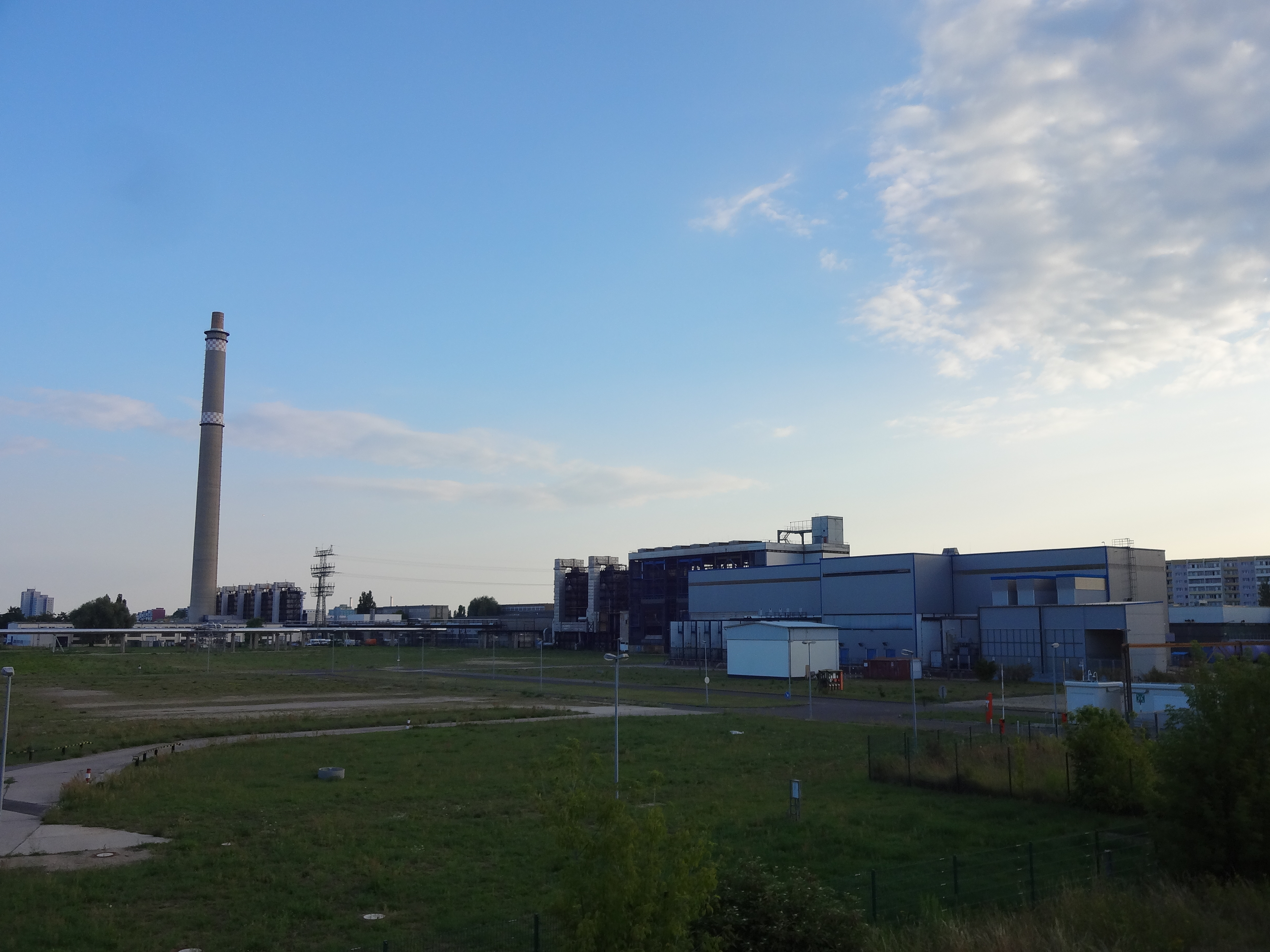 Heizkraftwerk Marzahn (witterungsbedingt außer Betrieb). Gebäudebestand 2014 aus nördlicher Richtung.